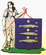 Wapen gemeente Enkhuizen